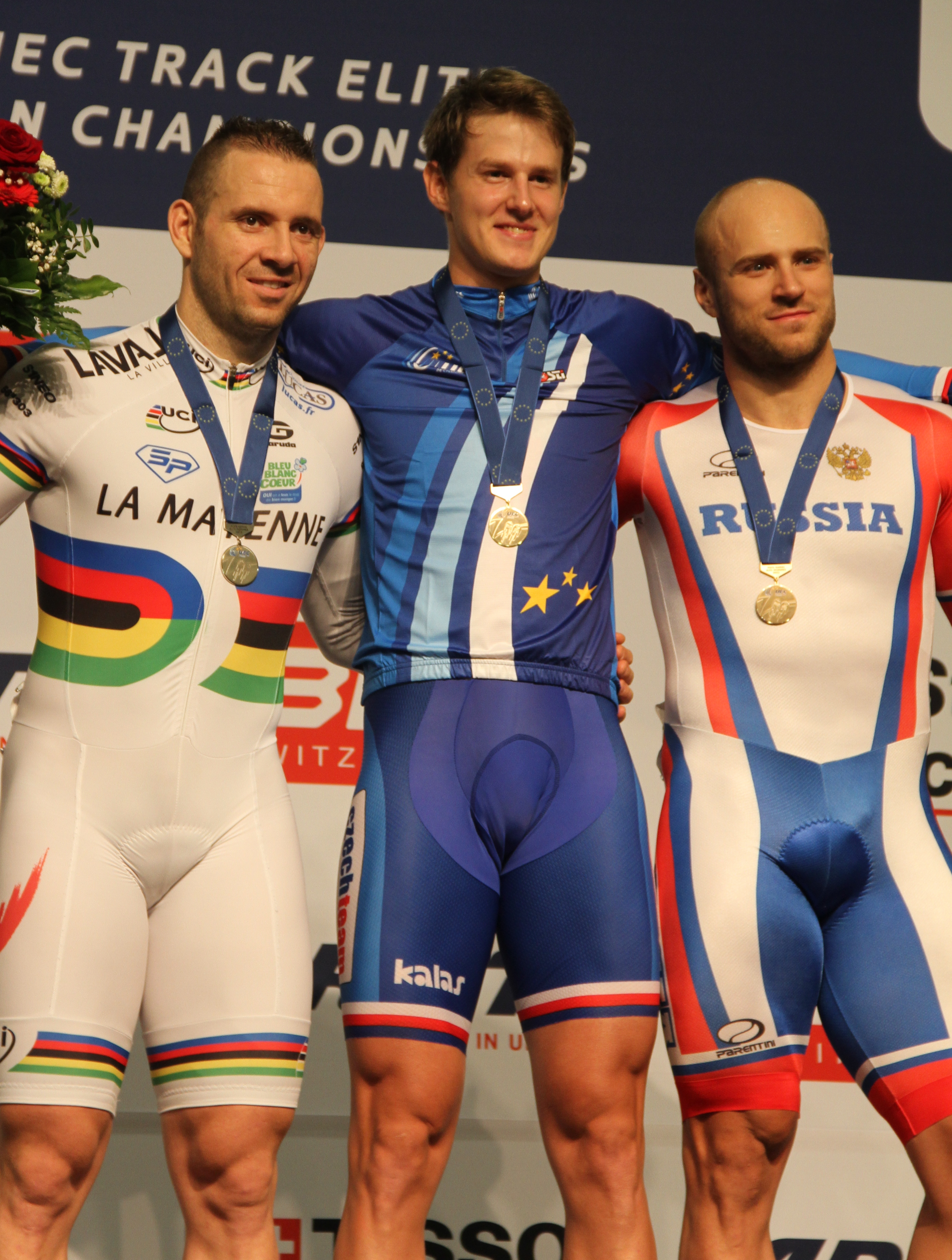 Podium Keirin der Männer (v.l.n.r.) François Pervis, Pavel Kelemen, Denis Dmitriev The making of this document was supported by the Community-Budget of Wikimedia Germany.